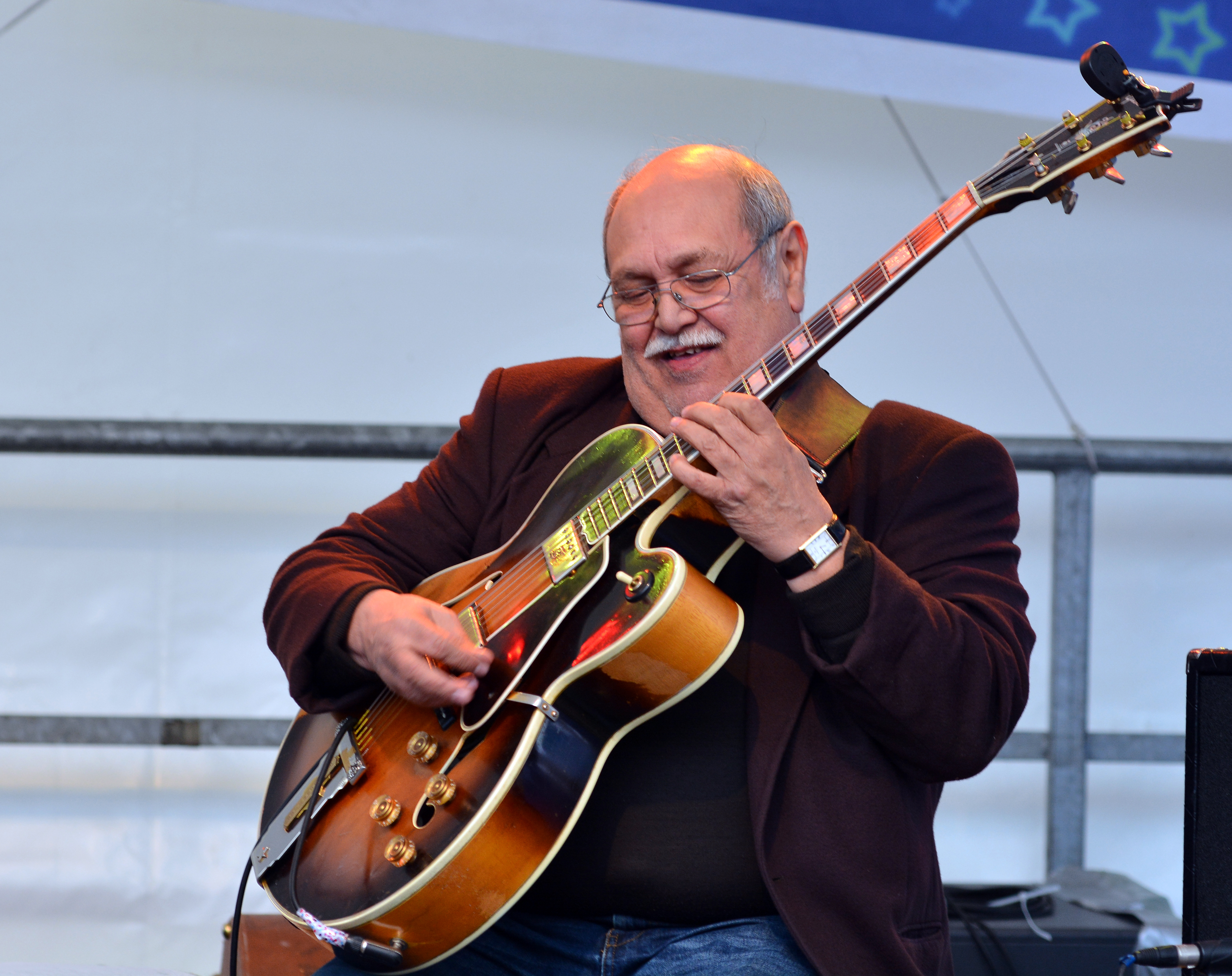 Der Solojazzgitarrist Joe Bawelino beim 825. Hamburger Hafengeburtstag 2014 am 11. Mai 2014